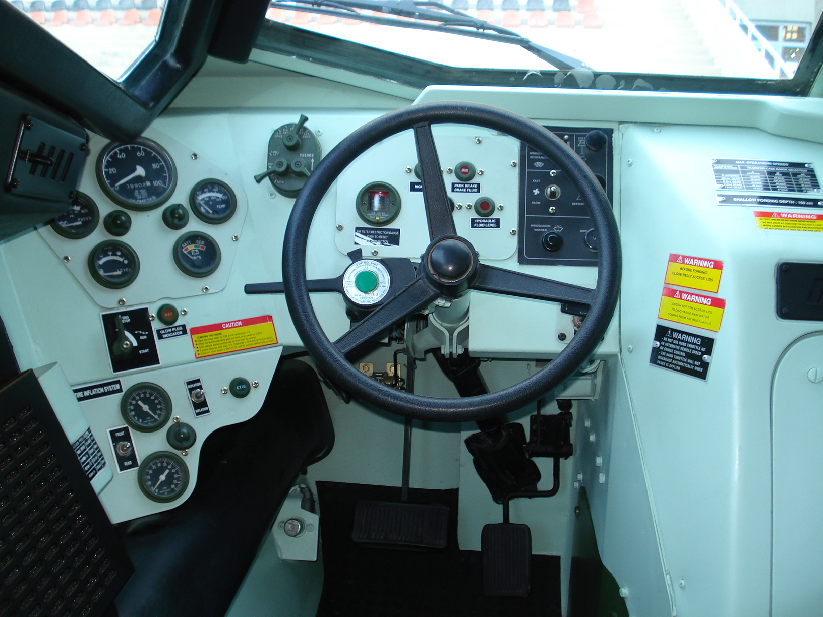 IDEF '07 Savunma Fuarı'nda çekildi.Otokar Kobraic. 23 Mayıs 2007